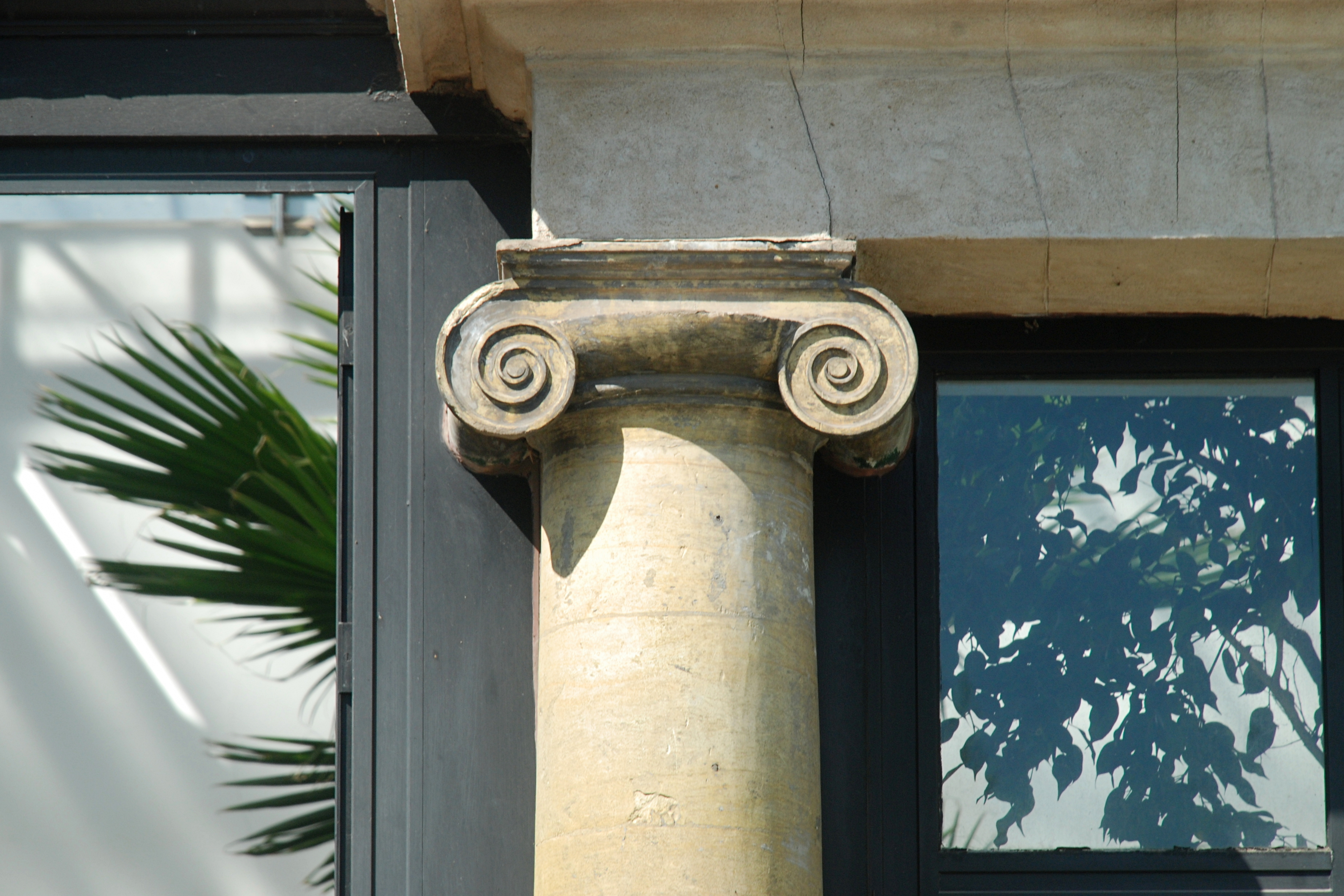 Belgique - Louvain - Jardin botanique (Kruidtuin) - orangerie néo-classique (architecte Charles Vander Straeten - 1821)